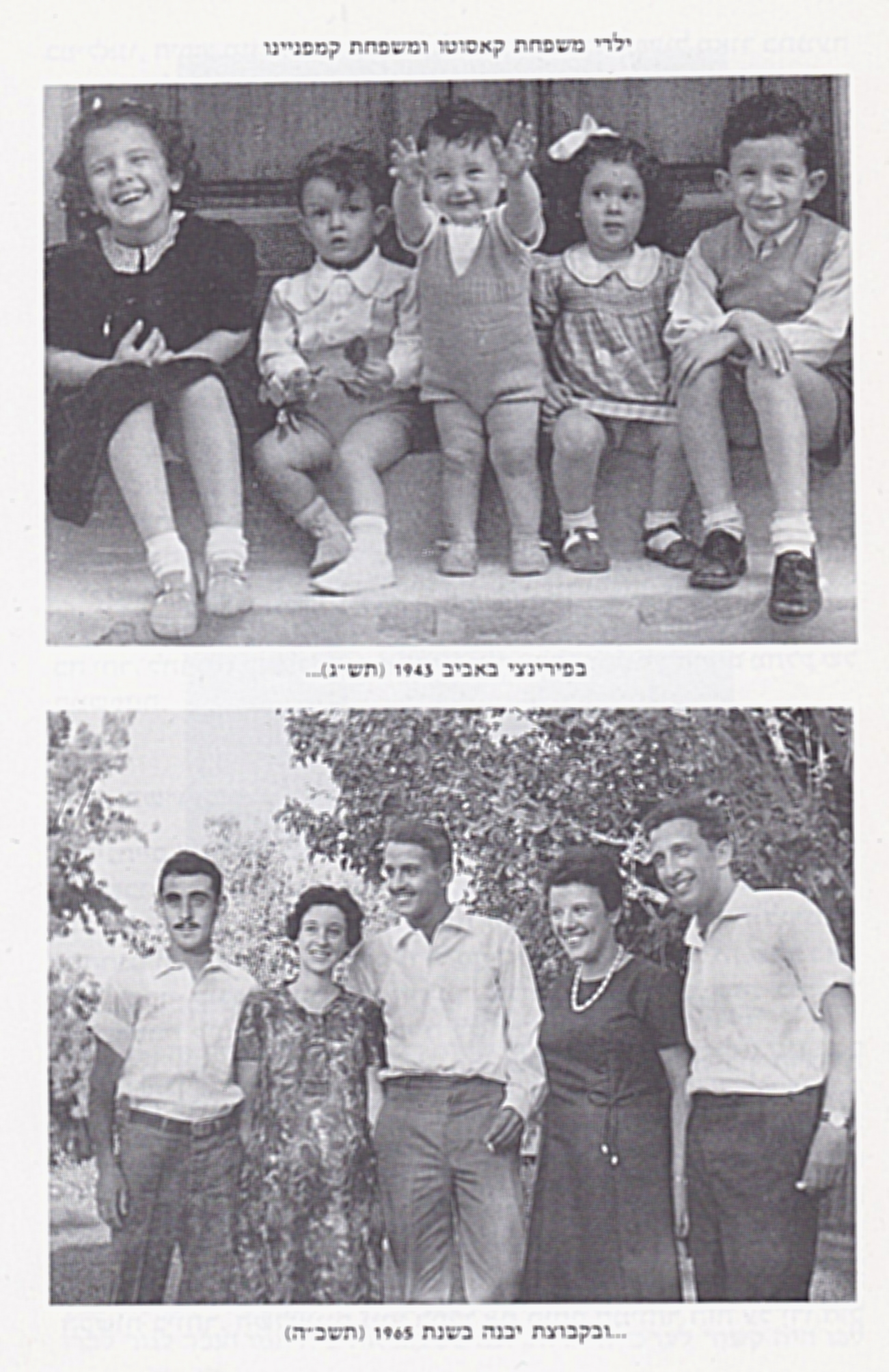 ילדי משפחת קאסוטו ומשפחת קמפניינו מלמעלה למטה: בפירנצה אביב 1943 (תש"ג), ובקבוצת יבנה בשנת 1965 (תשכ"ה). (מתוך: "לדור אשר לא ידע")